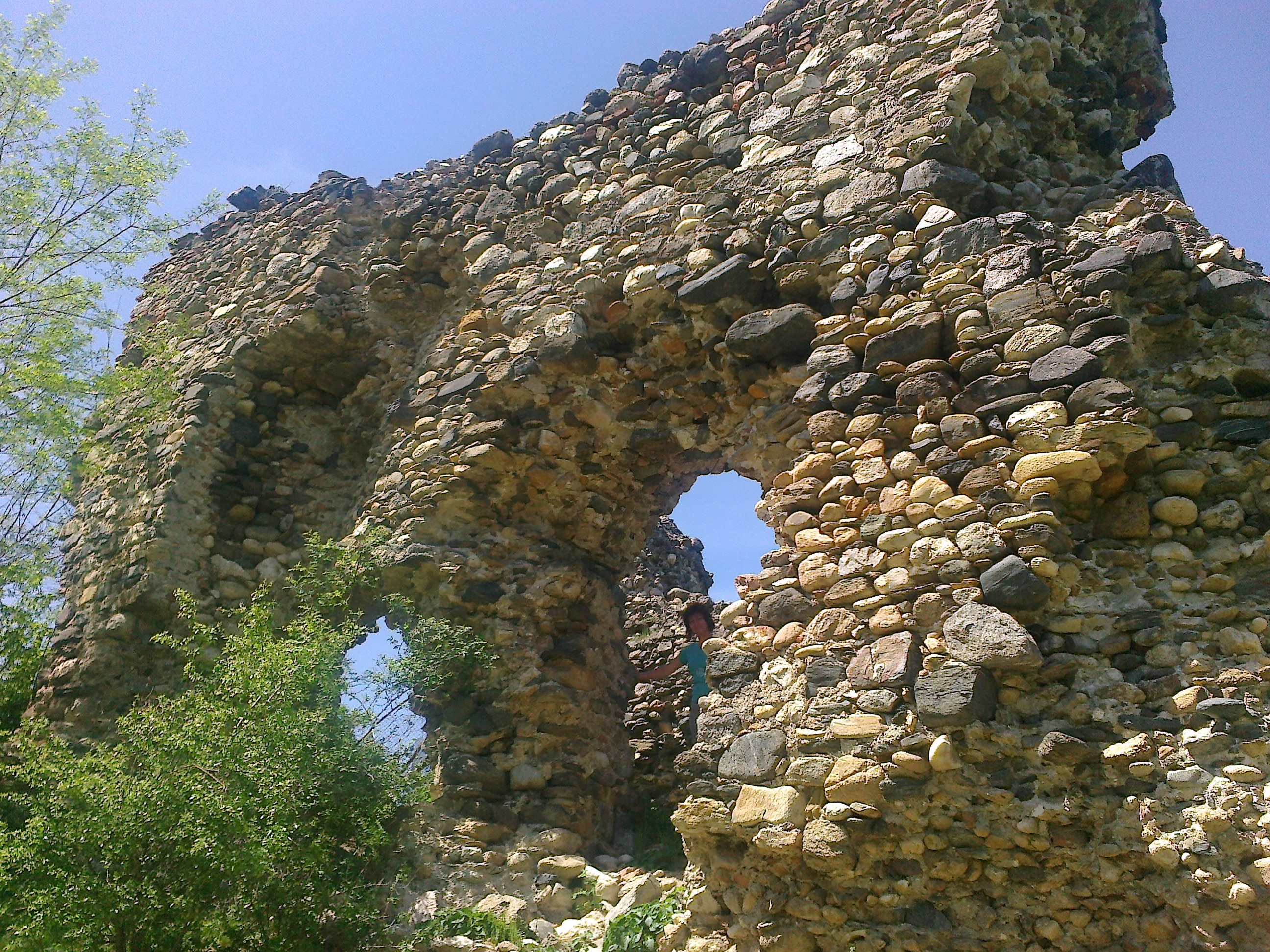 Cetatea Tălmaciului, „Coroana(cununa) țării”, denumită de racoviceni „Cășile uriașilor”.